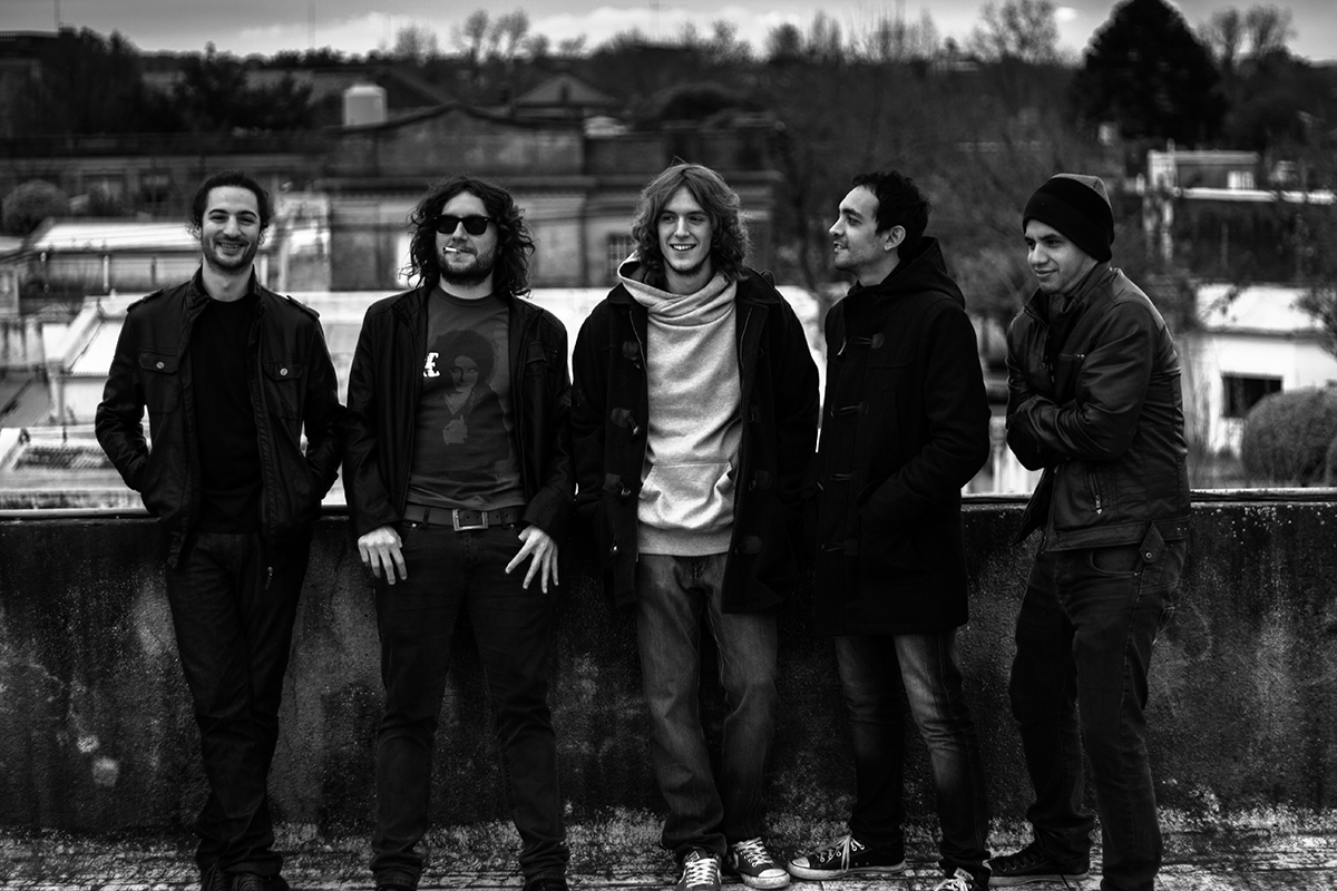 Los Onnix en el año 2014